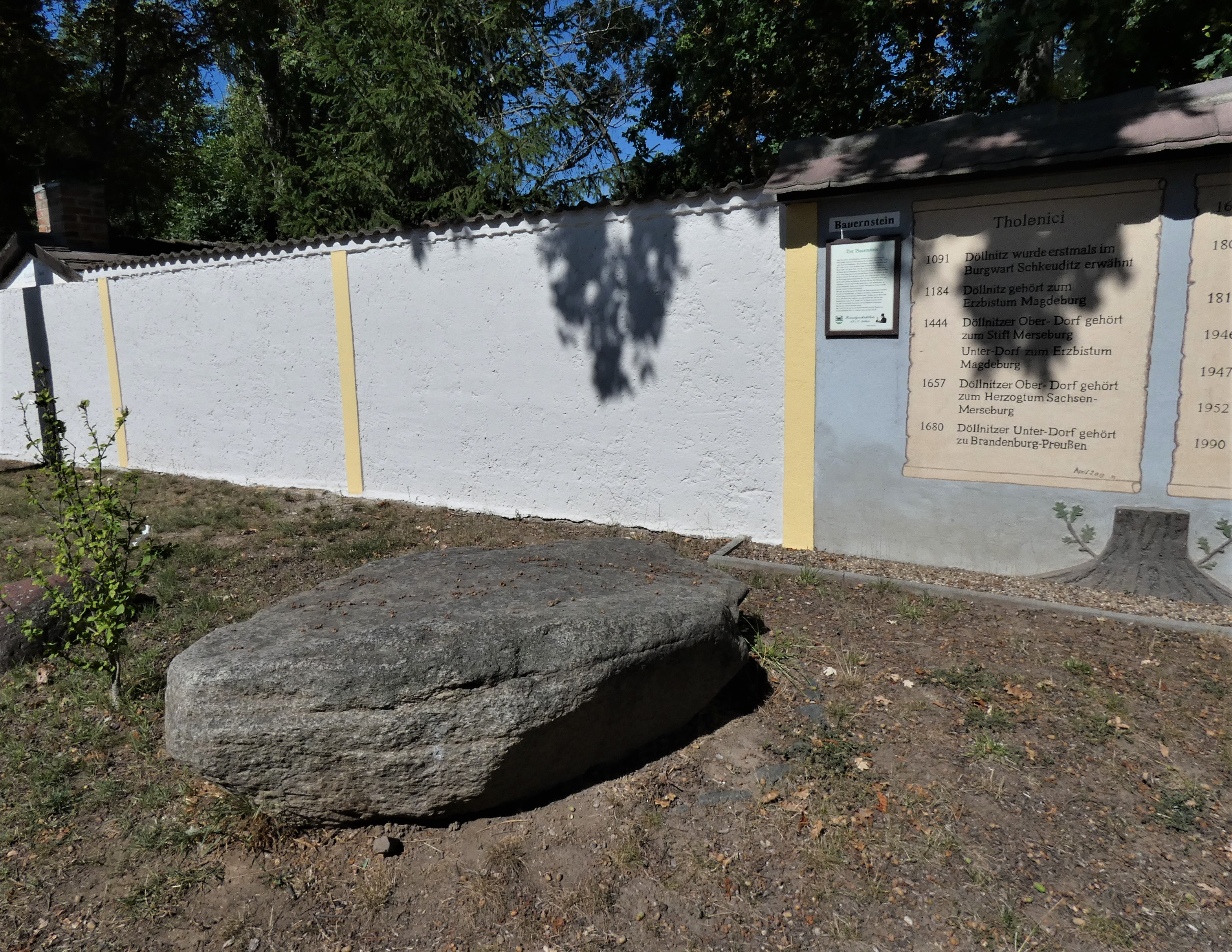 Bauernstein in Döllnitz, Gemeinde Schkopau, Saalekreis